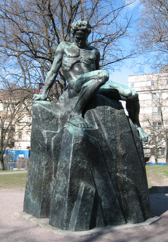 Carl Eldhs staty av August Strindberg i Tegnérlunden, Stockholm. Skulpturen "Den unge Strindberg i skärgården" är en skulptur i brons, gjuten hos Herman Bergmans Konstgjuteri, Enskede. Bronsen i Tegnérlunden i Stockholm kom på plats 1942.